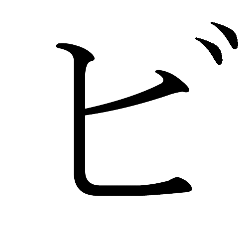 Japanese Katakana "Bi"